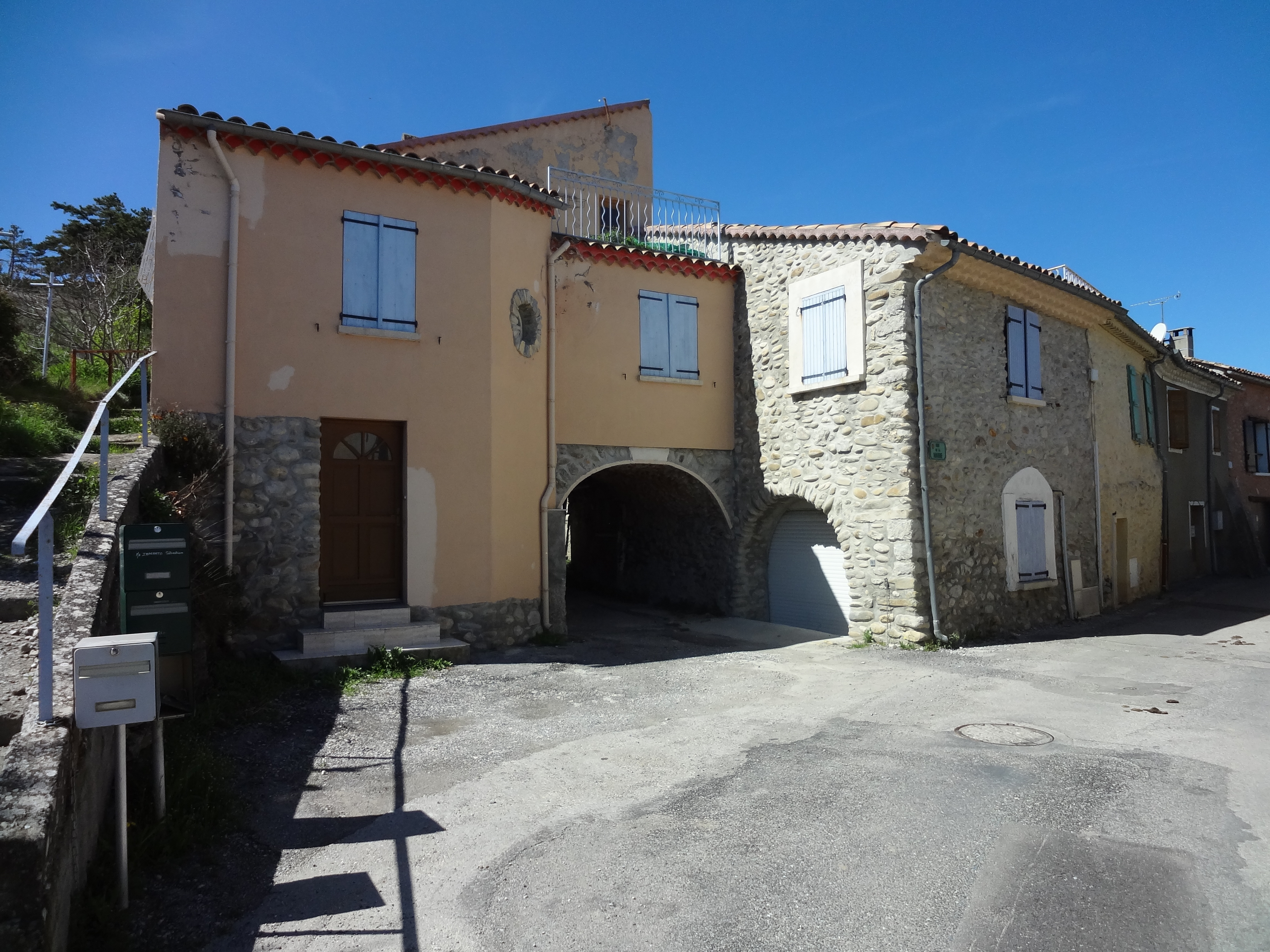 construite en galets, avec triple génoise